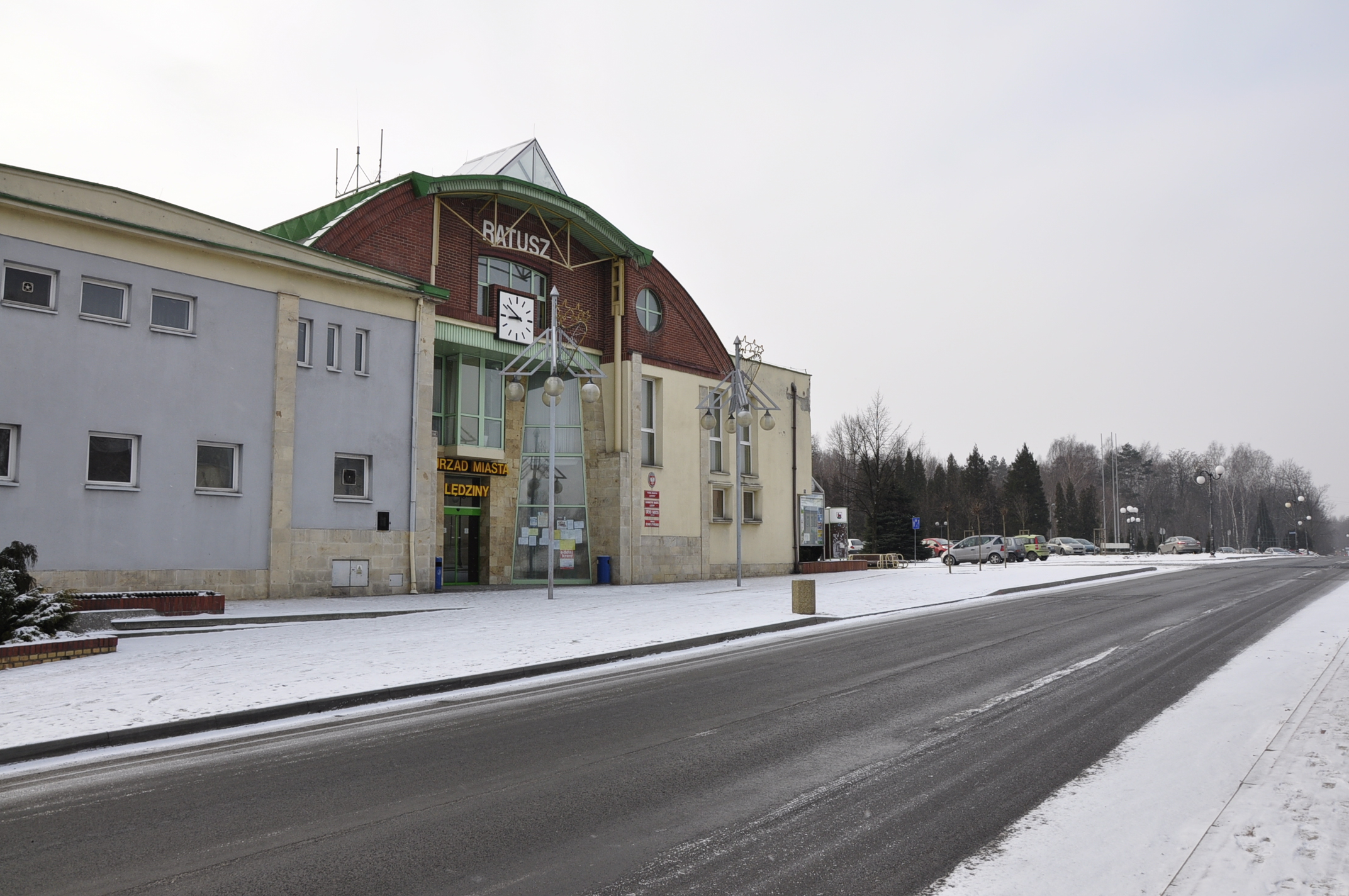 Urząd Miasta; Lędziny ul. Lędzińska 55.